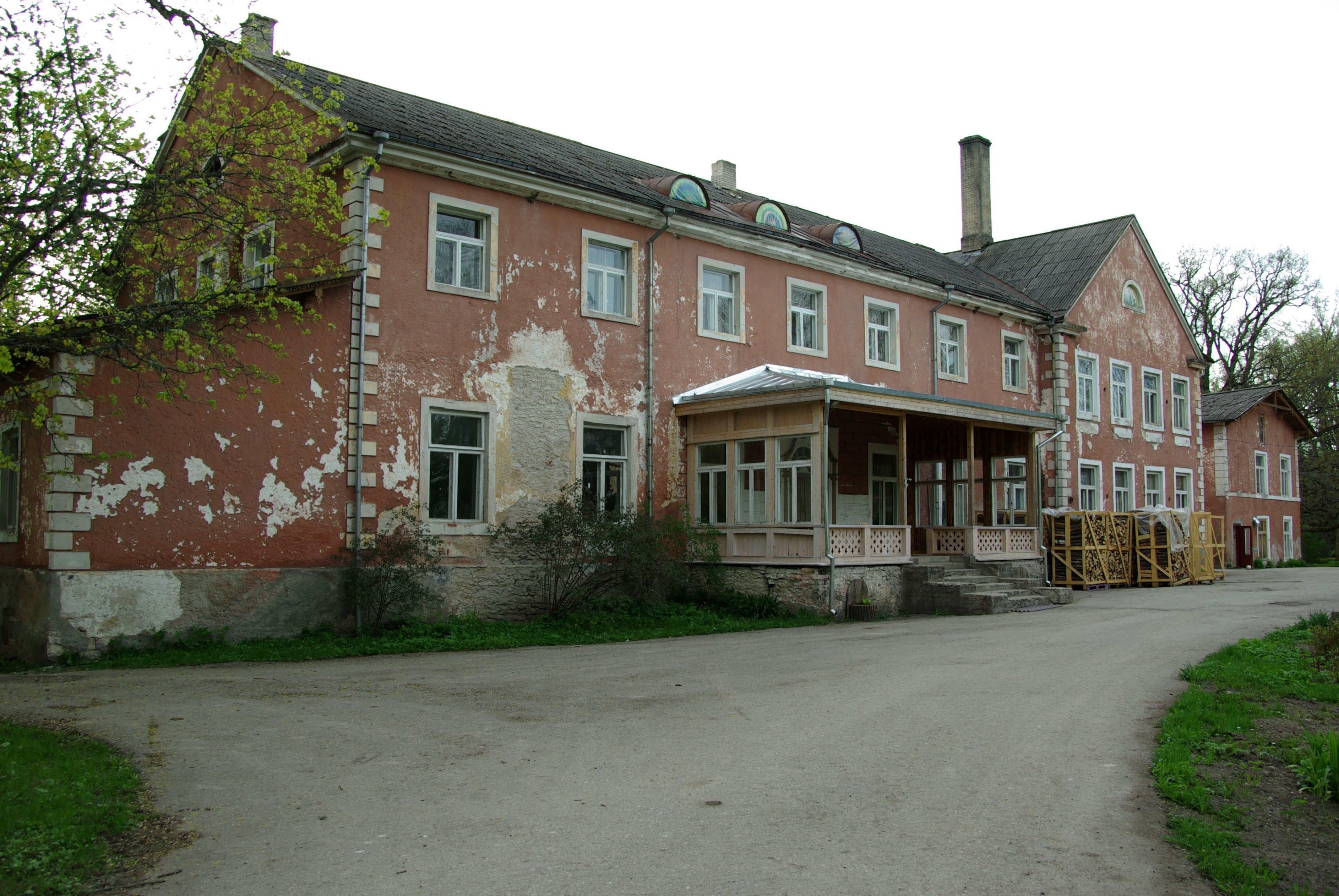 mõis Roosna-Alliku vallas Järva maakonnas